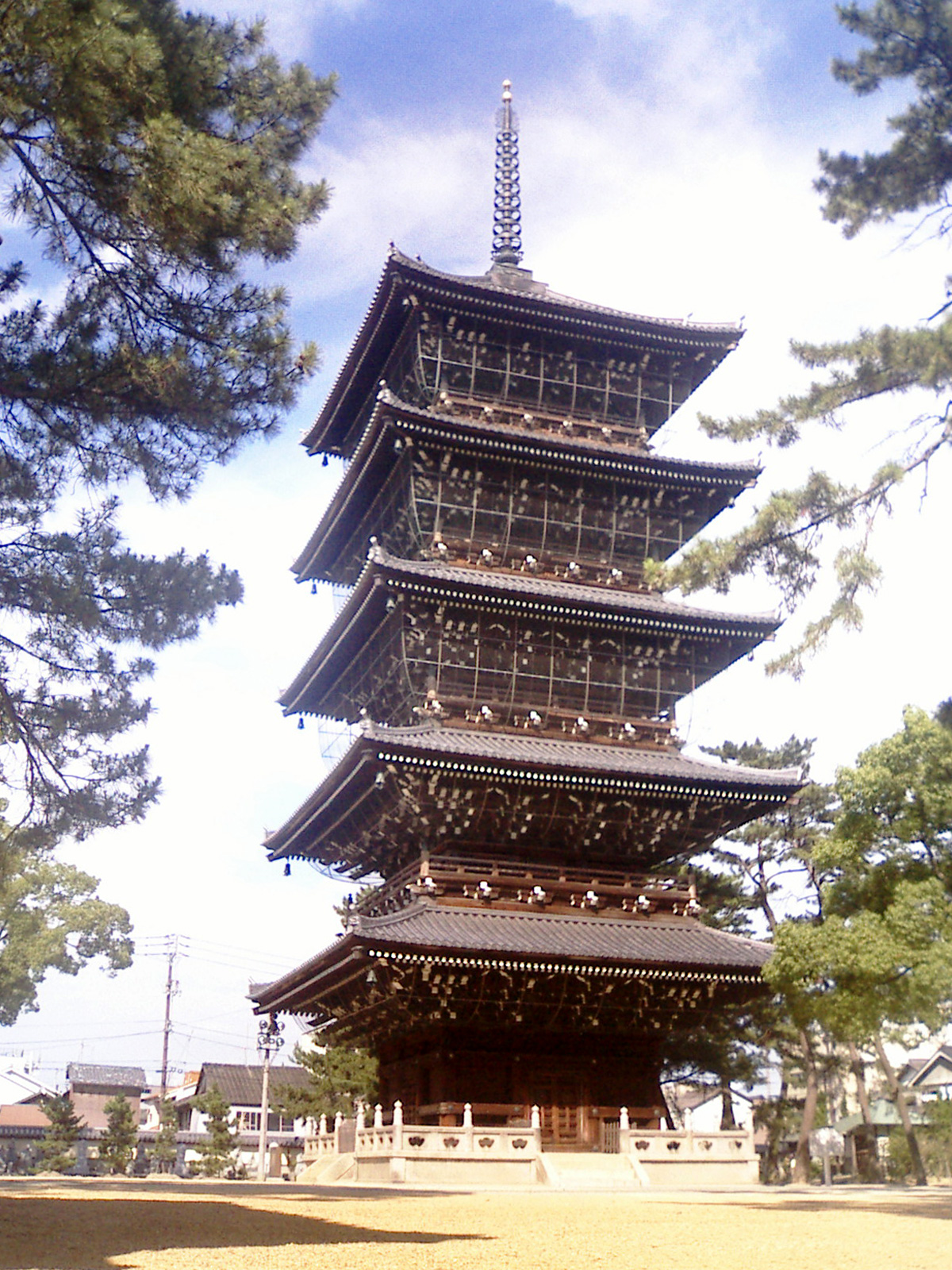 善通寺五重塔 - 日本国香川県善通寺市